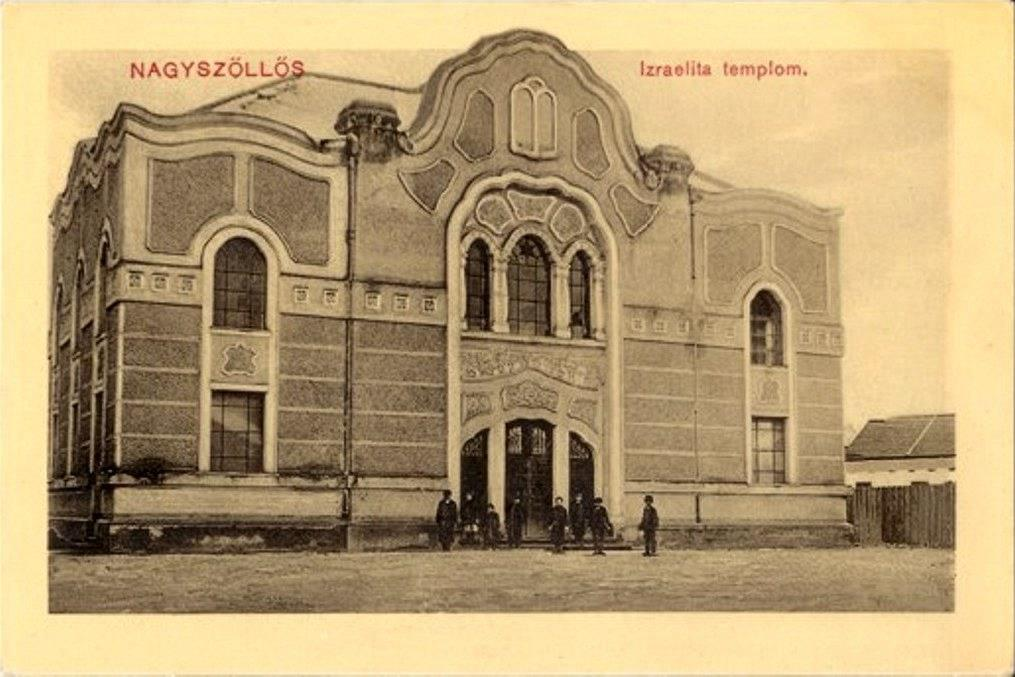 Üdvözlet Nagyszöllösröl Izraelita templom ( וינוגרדוב, Виноградів) בית הכנסת בסעליש.jpg